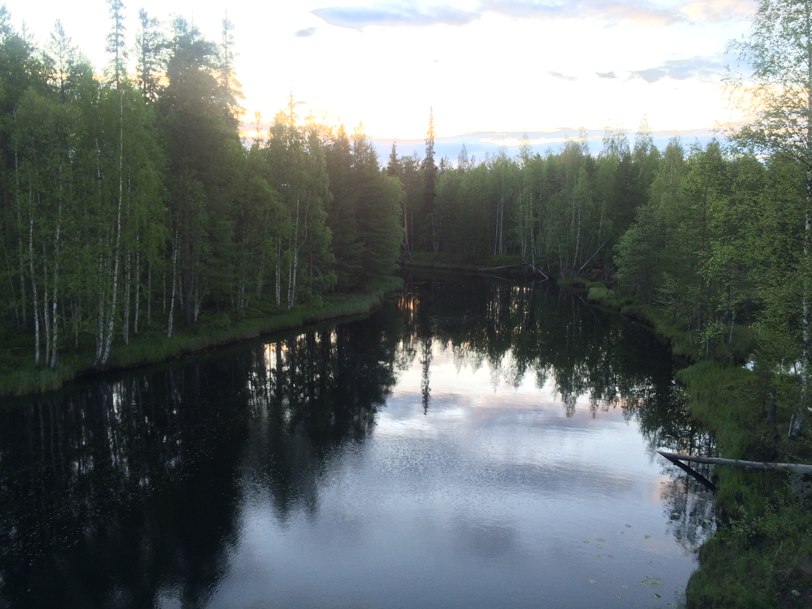 река Летняя (Кемский район)